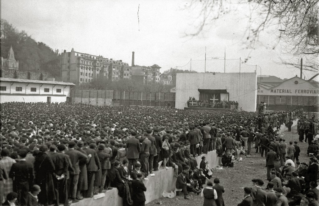 Aberri Eguna, 1933. Donostia, Gipuzkoa. Euskal Herria. Aberri Eguna - Basque Homeland's Day, 1933. Gipuzkoa, Basque Country.